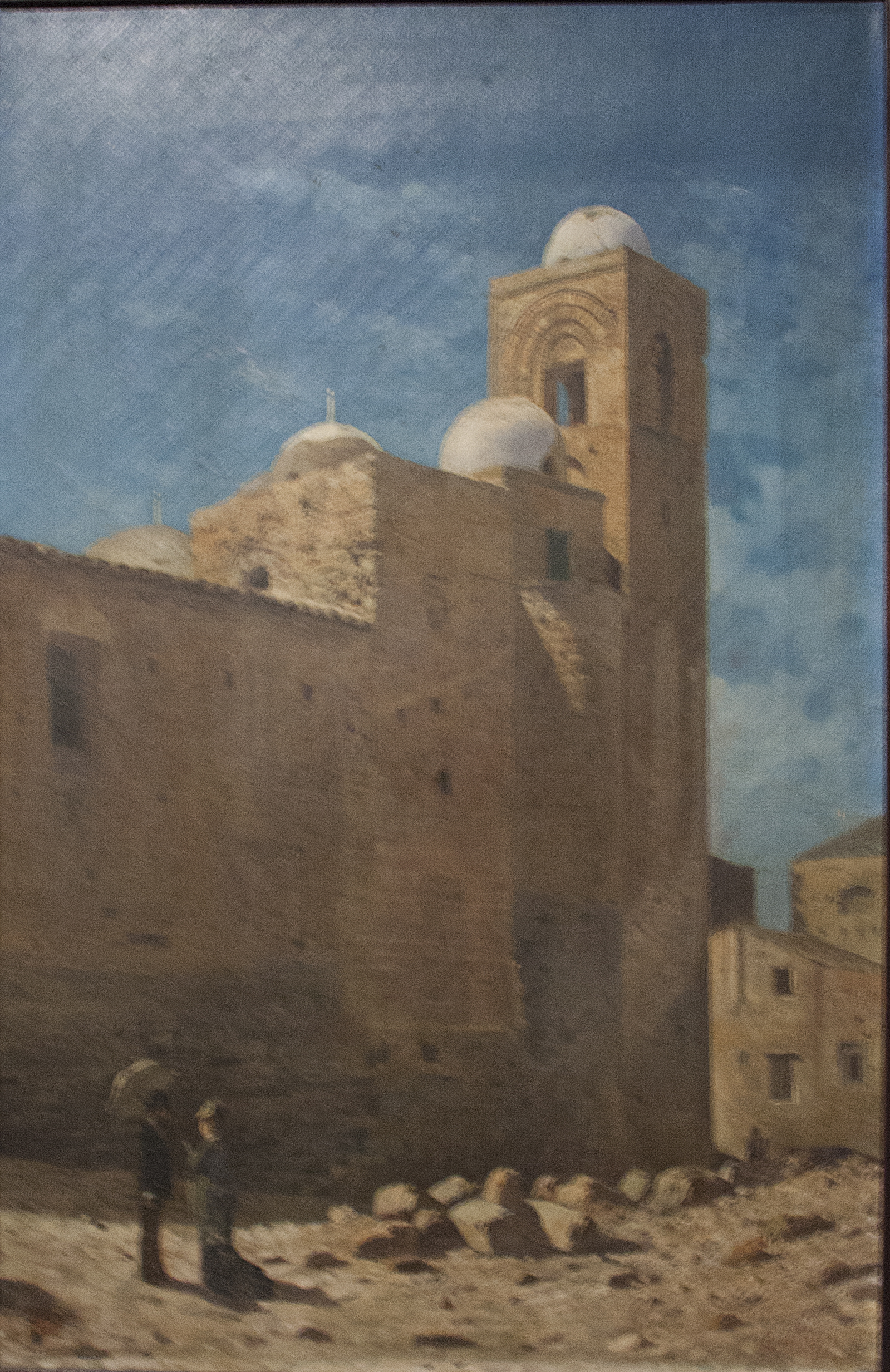 San Giovanni degli Eremiti - Rocco Lentini olio su tela 1876